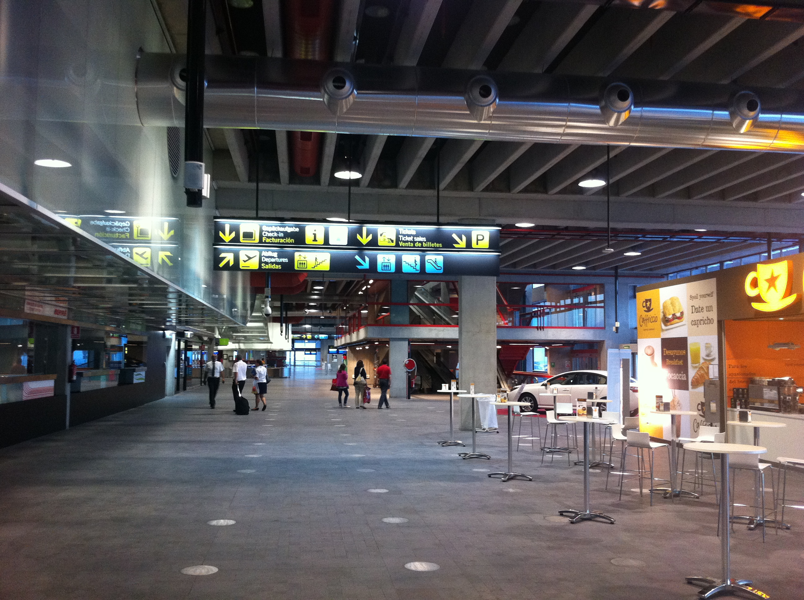 Innenansicht der Ebene 0 des neuen Terminals.